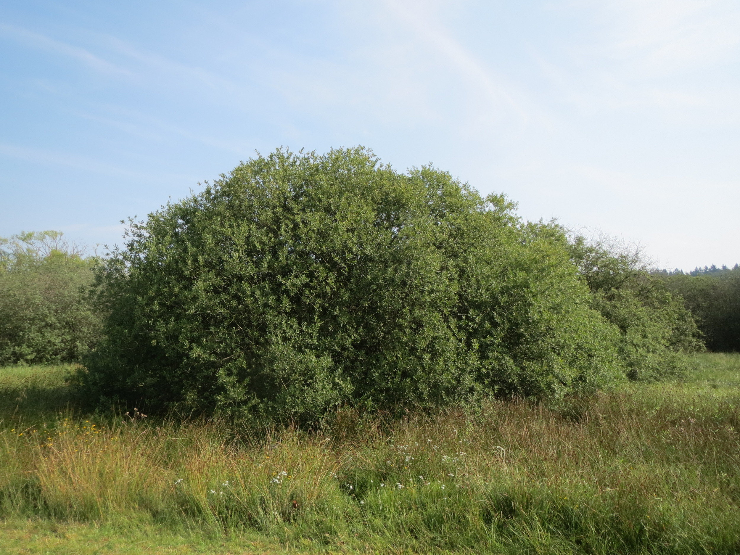 Asch-Weide (Salix cinerea) im Naturschutzgebiet Mürmes